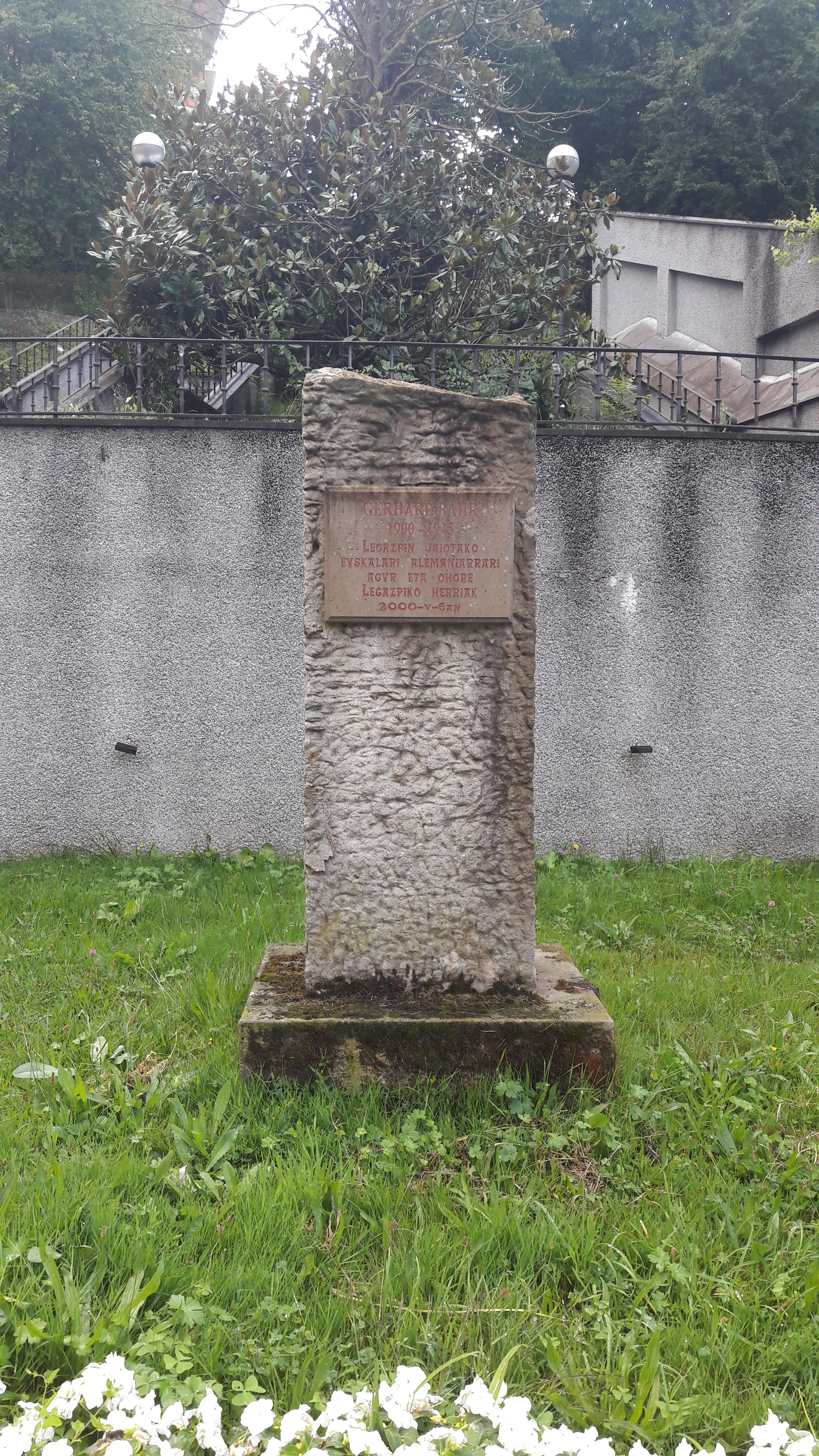 2000. urtean Gehrard Bähr zenaren omenez Legazpin jarritako oroitarria